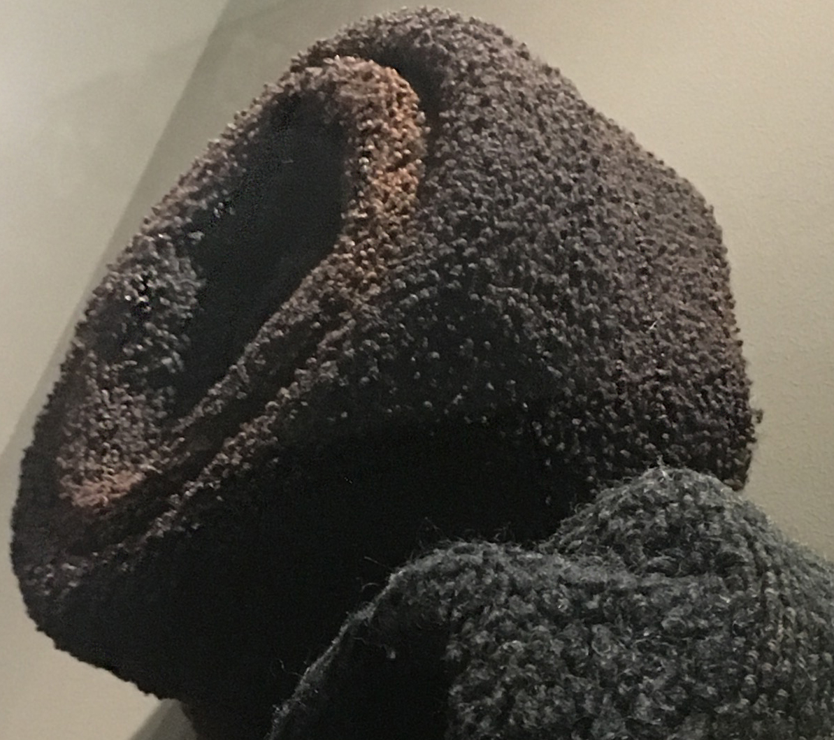 Šubara u okviru muške narodne nošnje izložene u Narodnom muzeju Kruševac